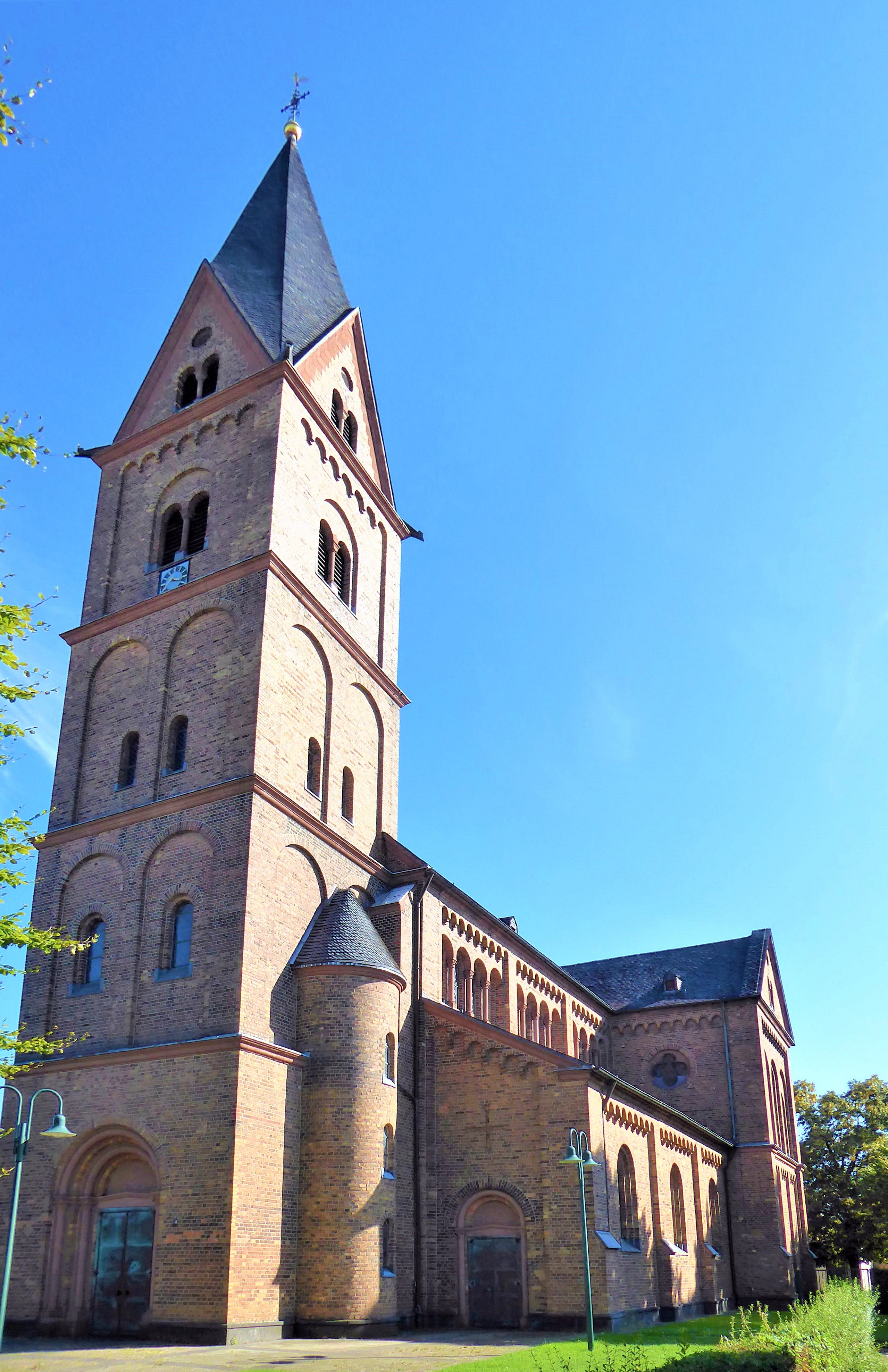 St. Augustinus (Menden)